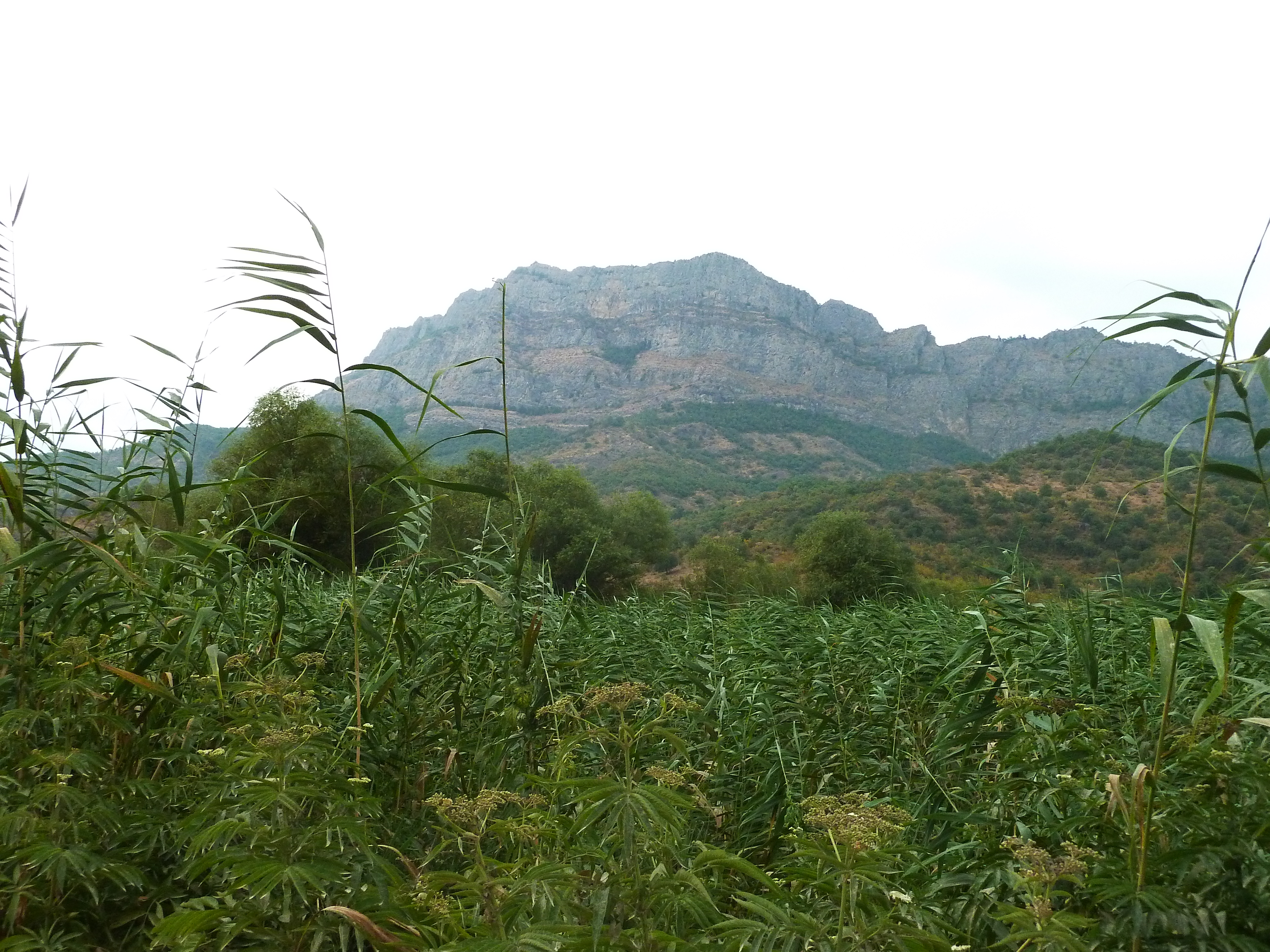 Дорога в Ковсакан.